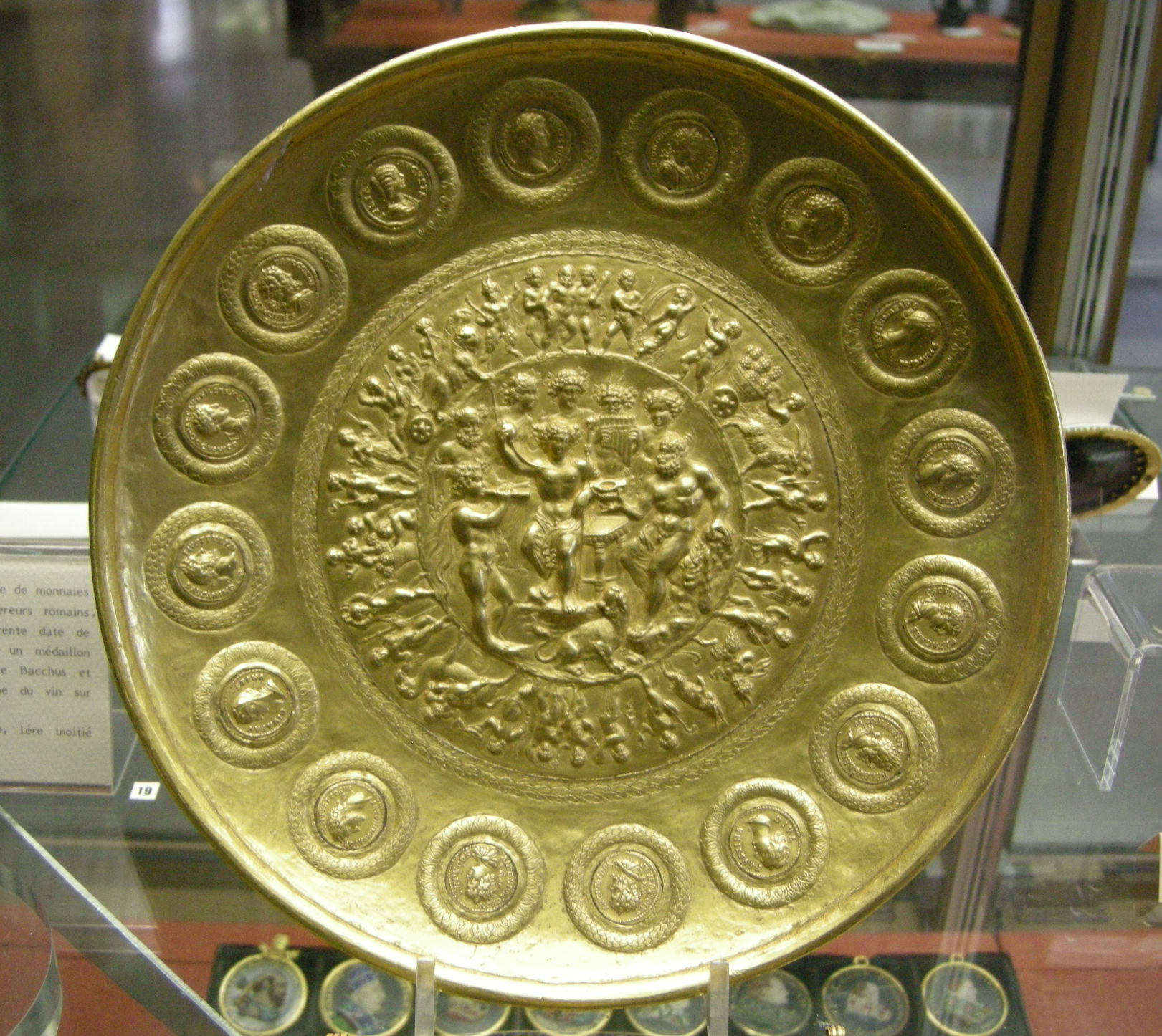 Cabinet des médailles, Paris. Patera di Rennes, oro decorato da monete imperiali da Adriano a Geta, al centro medaglione con Bacco e Ercole, metà III sec. dc